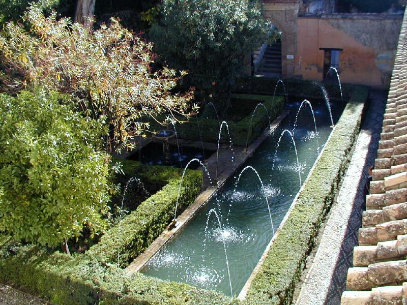 Alhambra, Granada, SpainGeneralife - Alhambra Palaces & Gardens, Granada, Spain